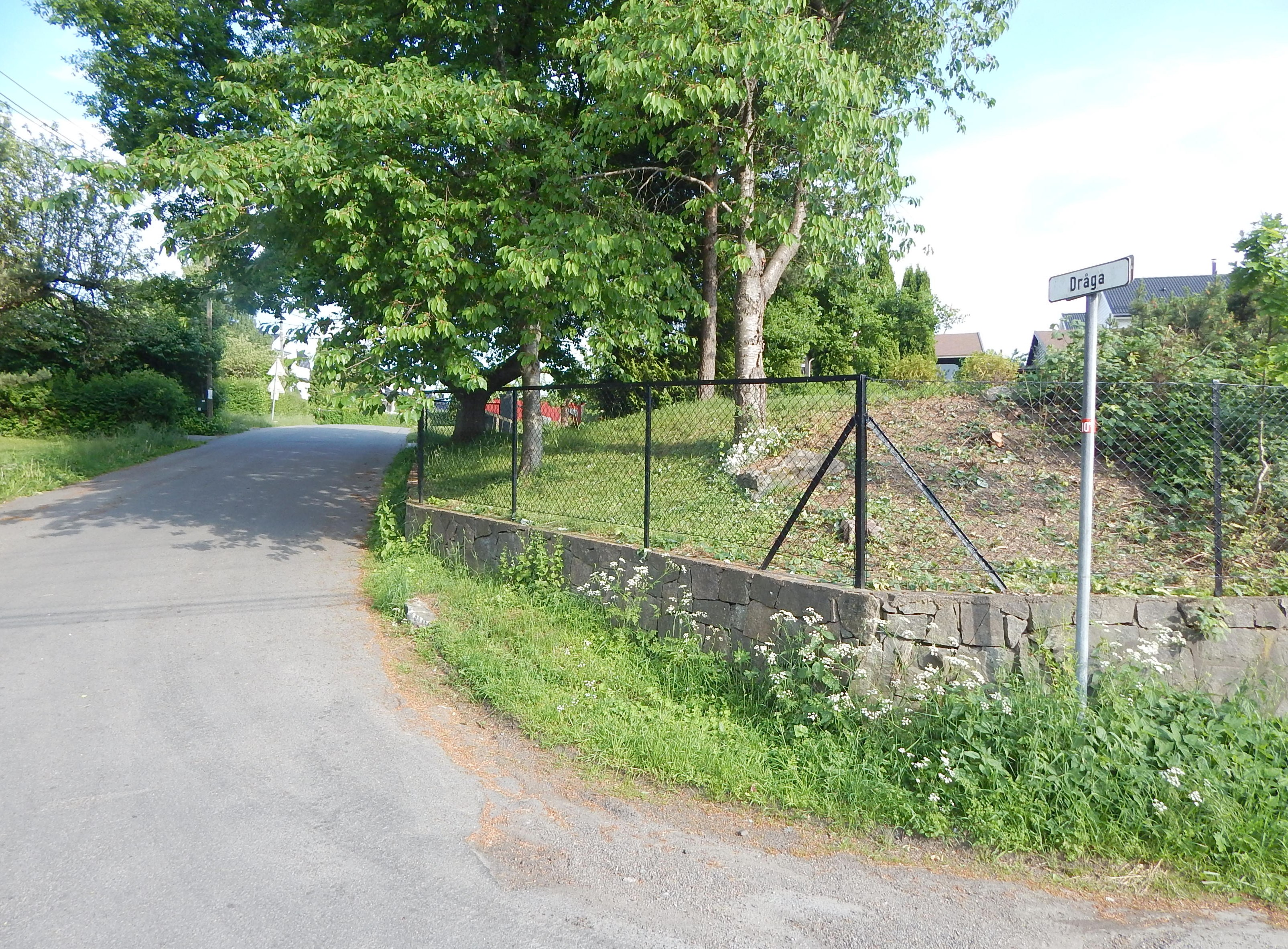 Dråga sett fra Simensbråtveien